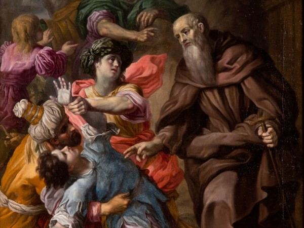 San Antonio Abate resuscita un giovane assassinato. Olio su Tela, cm 180x150. Parrocchia San Antonio, Vacciago (Novara)